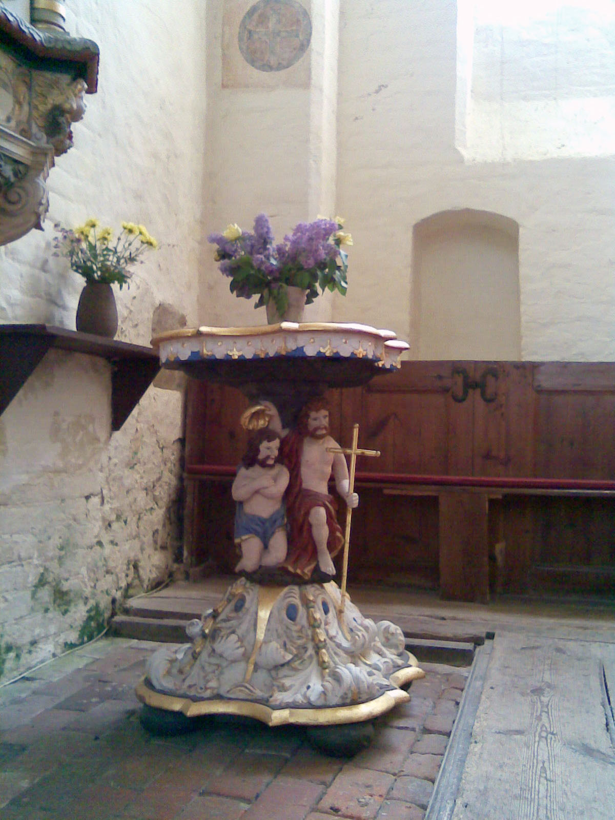 Taufe Kirche Schaprode